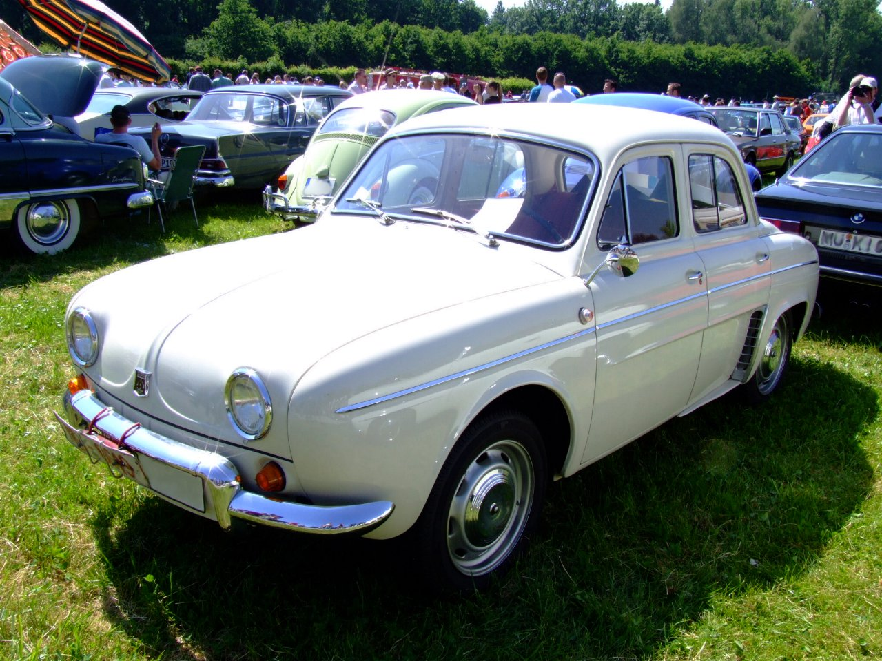 Renault DauphineGordini, Bj. 1965, PS: 40